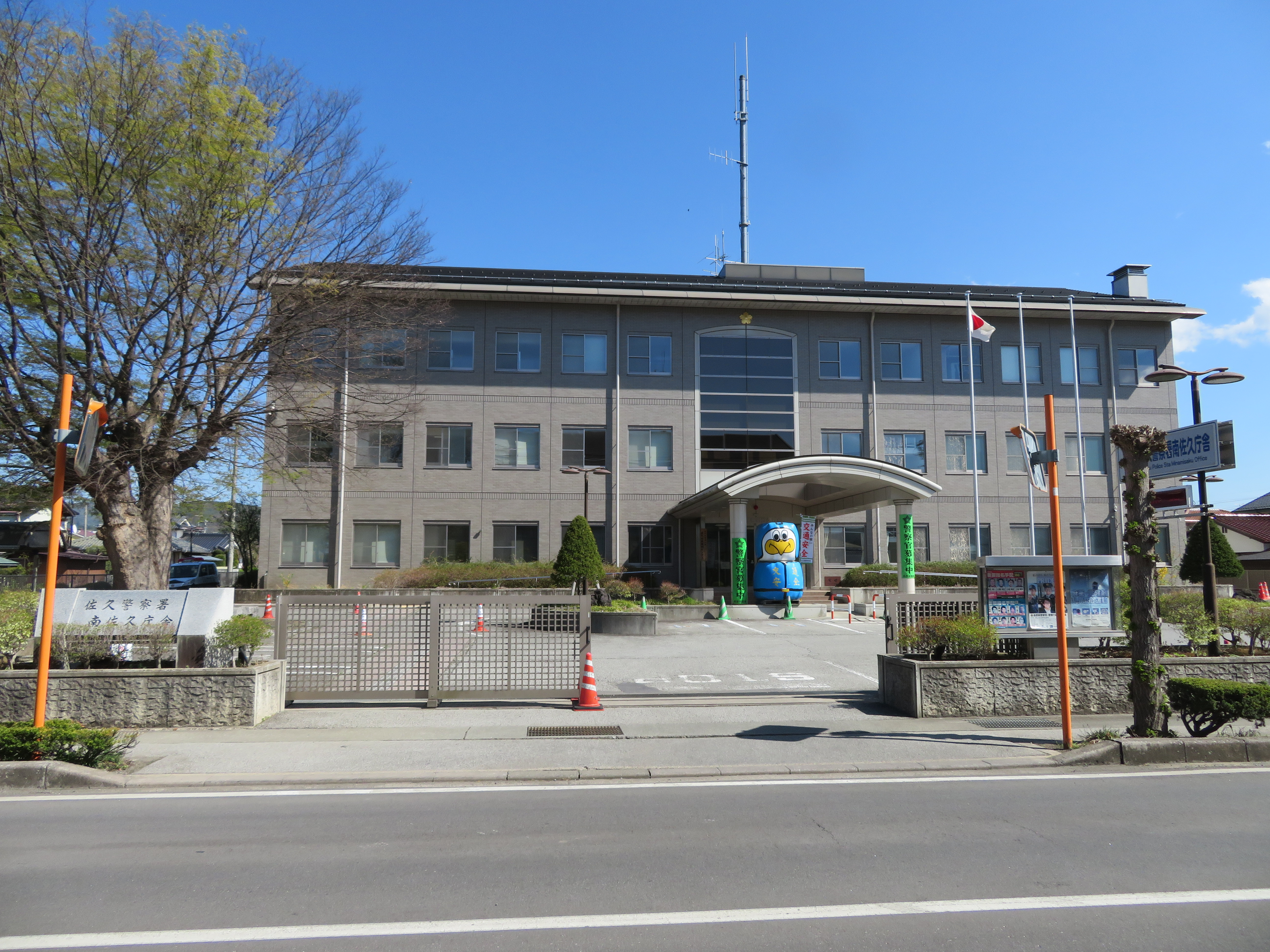 佐久警察署南佐久庁舎（旧南佐久警察署庁舎） Canon PowerShot SX720 HS